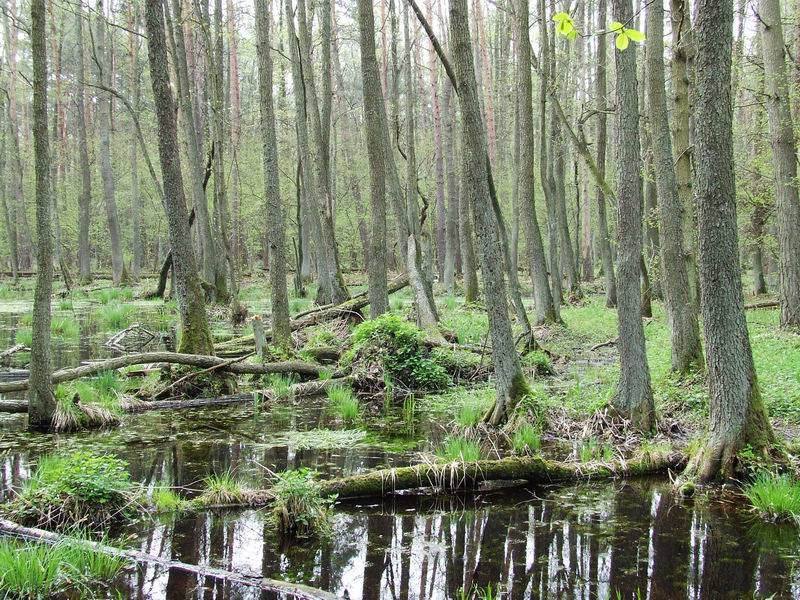 Dziekanow Lesny, part of Lomianki, in national park